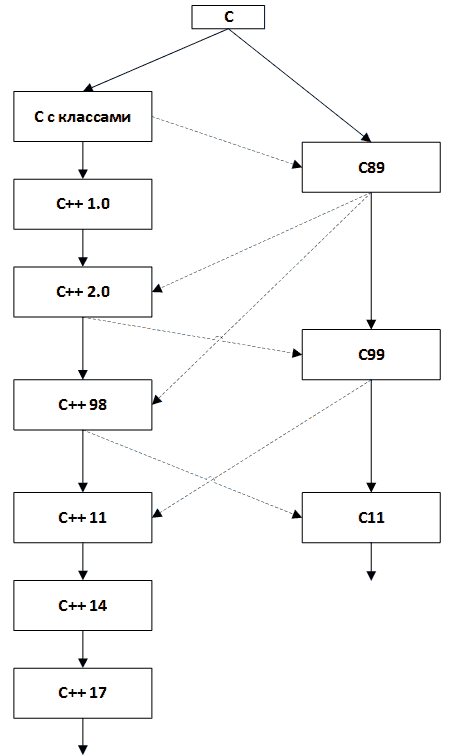 Генеалогия и взаимовлияние языков Си и C++.